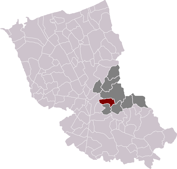 Locatie gemeente Terdegem in arrondissement Duinkerke. Zelfgemaakt. Location of Terdeghem municipality in the arrondissement of Dunkirk. Self made. Localisation de la commune de Terdeghem dans l'arrondissement de Dunkerque. Fait moi-même.